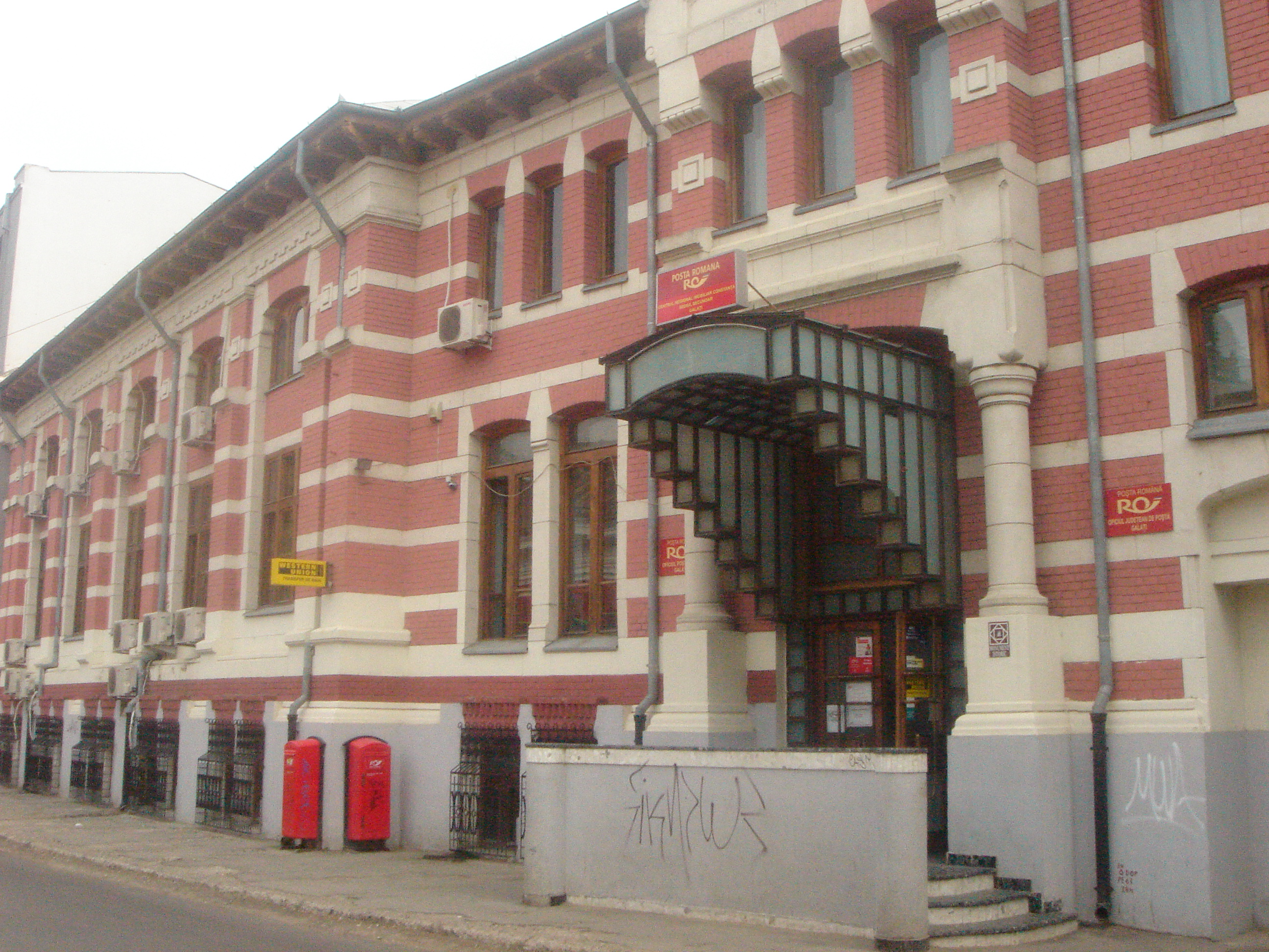 Palatul Postei, aflat pe Strada Lahovary, cunoscut ca Posta Centrala, in imediata vecinatate a Parcului Municipal Mihai Eminescu.